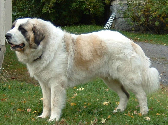 Mastín del Pirineo «Puma Tajadera Del Tio Roy» (male), Photo by Anja Niiranen, Finland